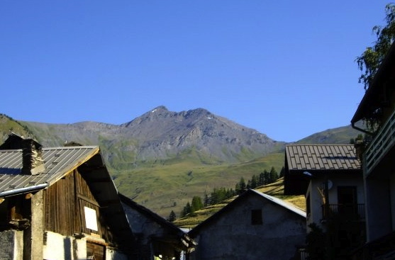 Sommet du Bric Froid depuis Le Roux d'Abriès.